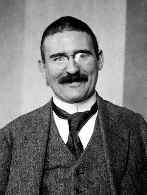 Гольдшмидт, Виктор Мориц (Victor Moritz Goldschmidt)